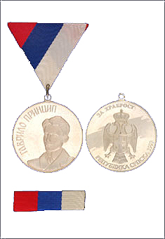 Srpski (latinica): Medalja za hrabrost srebrna